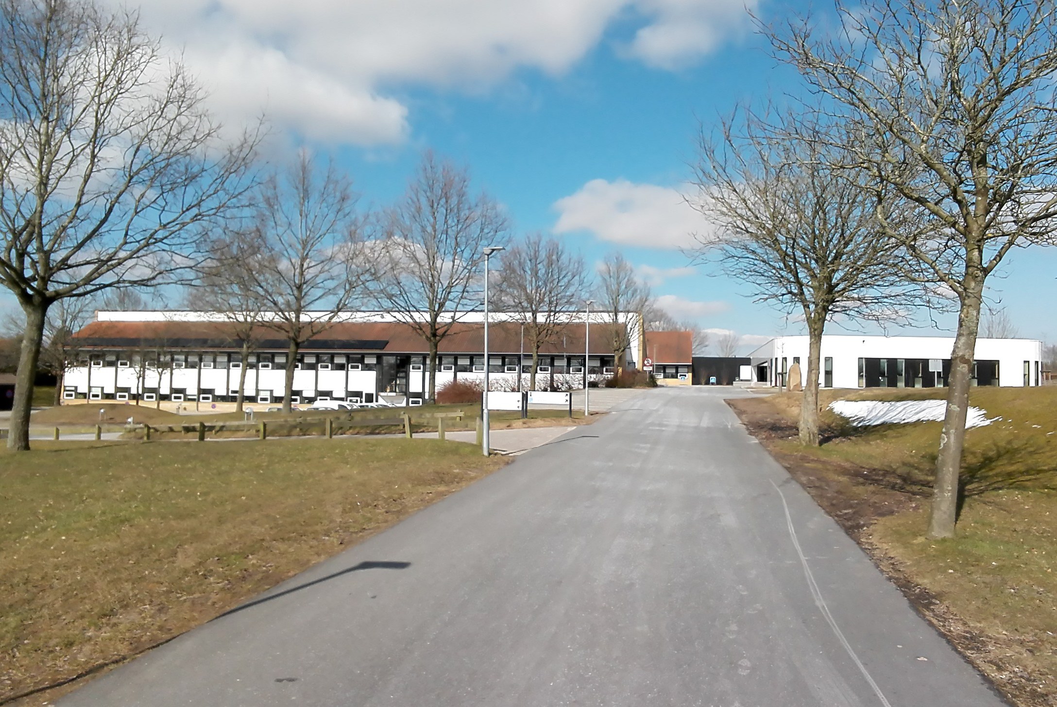 Lejre Kommunes kommunekontor i Hvalsø